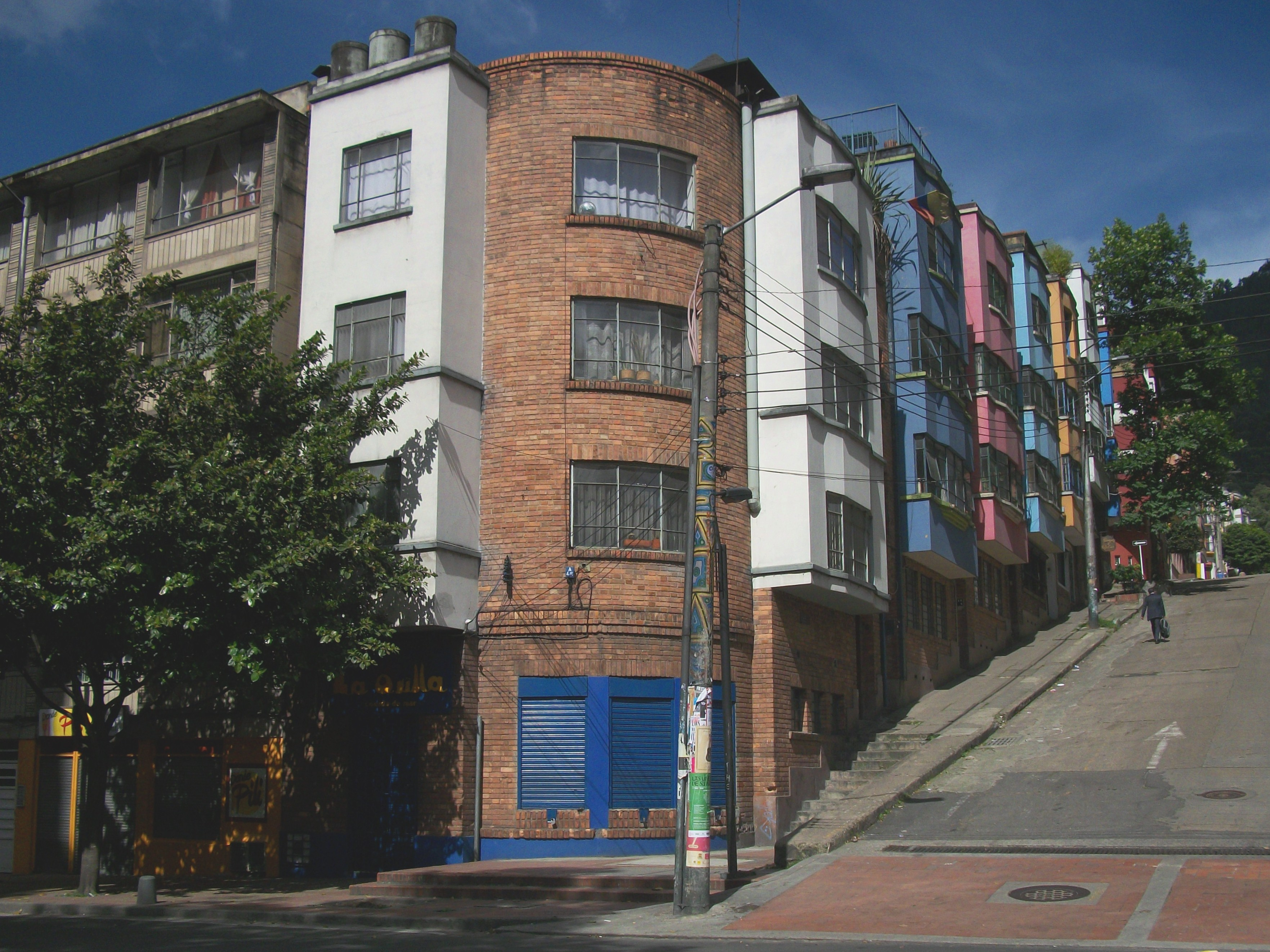 Bogotá, casas calle 26 con cra 5, barrio La Macarena.